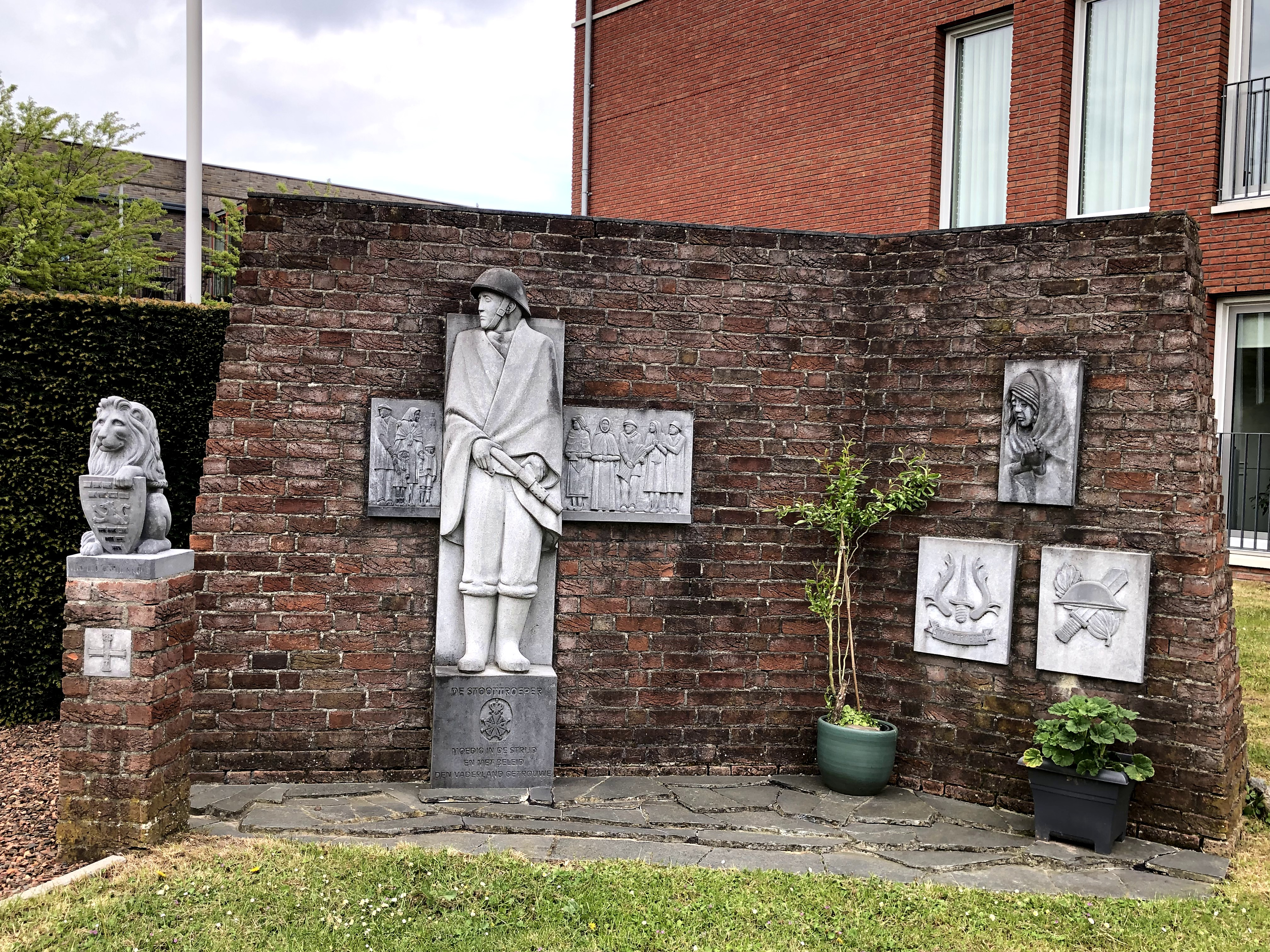 Gedenkteken dat op 8 oktober 2000 is onthuld op het ereveld. In het midden staat een soldaat gemaakt uit wit natuursteen. Deze soldaat kijkt naar de graven van zijn drie gesneuvelde kameraden. Op het voetstuk van de soldaat staat: 'DE STOOTTROEPER MOEDIG IN DE STRIJD EN MET BELEID DEN VADERLAND GETROUWE.' Op de muur aan de rechterkant is een vrouw te zien die bedroefd naar haar gestorven man kijkt. Daaronder hangt het embleem van het Regiment Stoottroepen. Het reliëf achter de Stoottroepers stelt de burgerbevolking voor die de soldaat heeft beschermd en geholpen. De muur waartegen het beeld is geplaatst staat symbool voor de dijken van West Maas en Waal. De 'vloer' van het gedenkteken is gemaakt van Noorse lei en stelt het water aan de dijk voor.